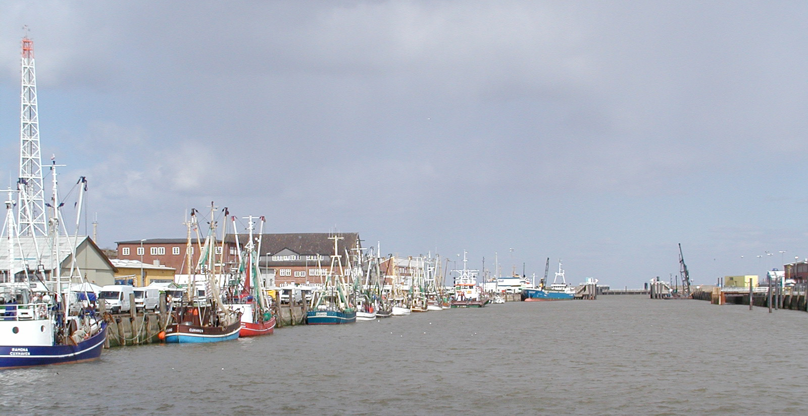 Der Fischereihafen beim Fischmarkt